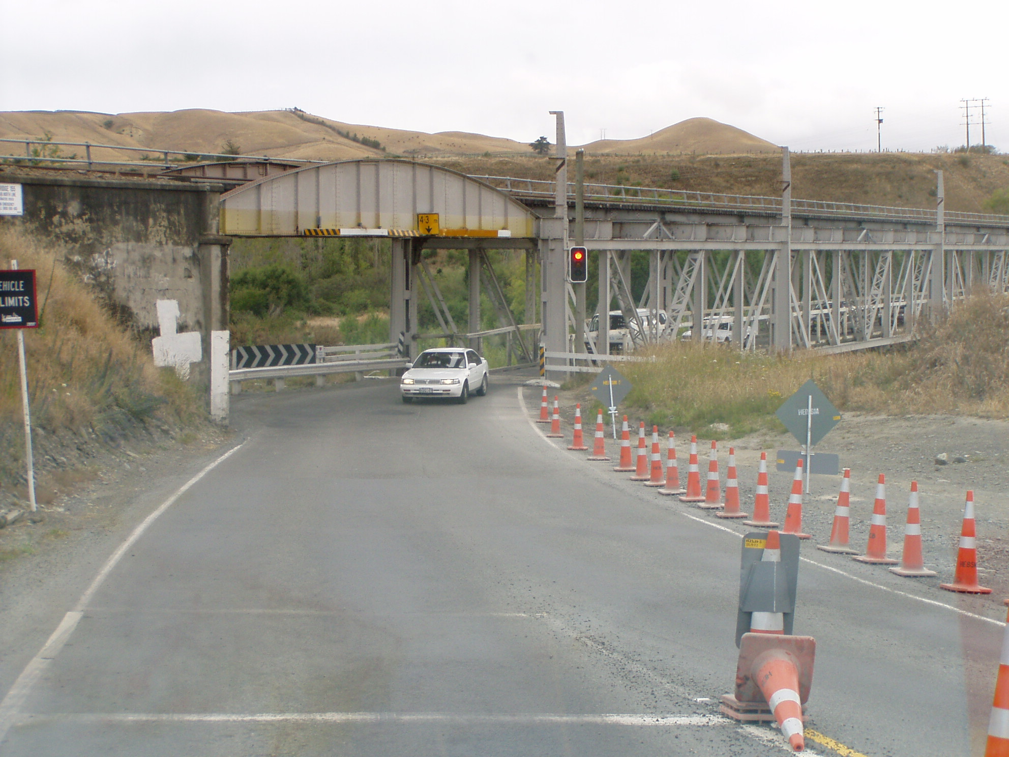 Kombinierte Strassen/Bahnbrücke bei Seddon, Neuseeland